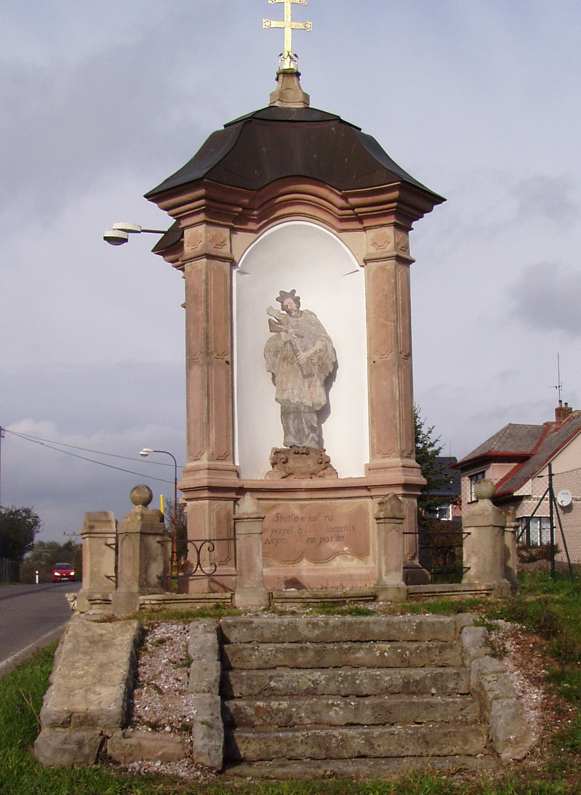 Kaple sv. Jana Nepomuckého (Žireč), při silnici na Dvůr Králové nad Labem, Žireč